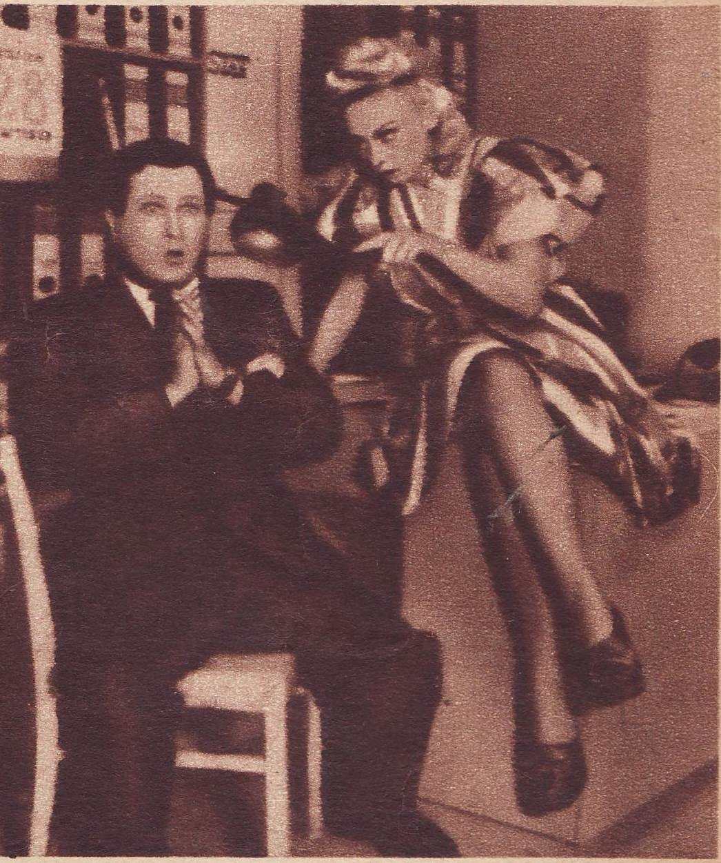 Zofia Jamry i Aleksander Olędzki w sztuce "Podwójna buchalteria" A. Bissona "Stary Dworek" Adama Ważyka. Teatr Letni w Poznaniu.